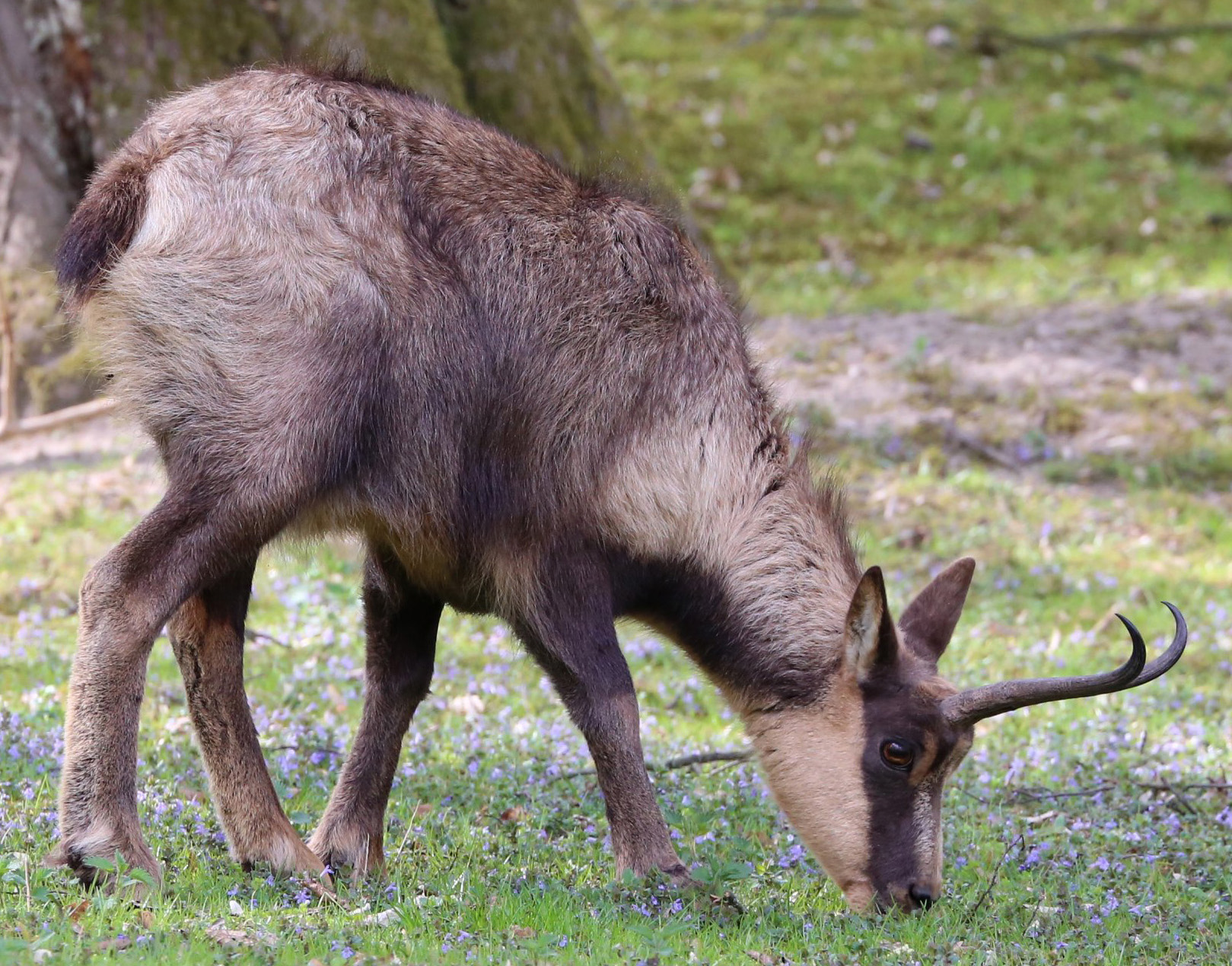 Abruzzengämse (Rupicapra pyrenaica ornata) im Tierpark Hellabrunn.